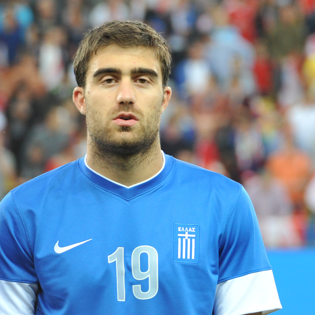 Freundschaftliches Länderspiel Österreich - Griechenland am 14. August 2013 in Salzburg: Sokratis Papastathopoulos